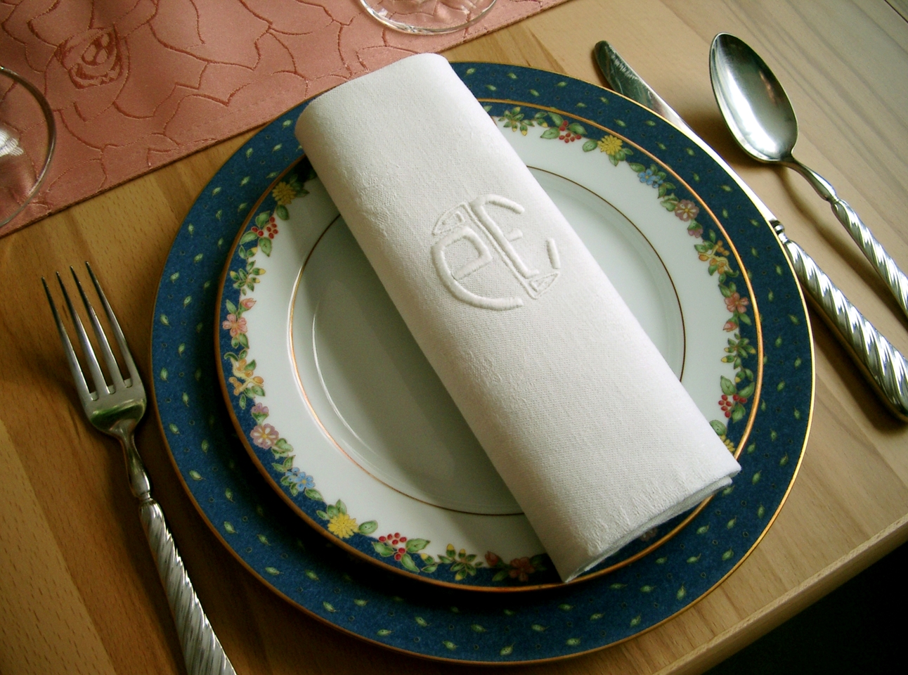 Zerwéit mat brodéiertem Monogramm.